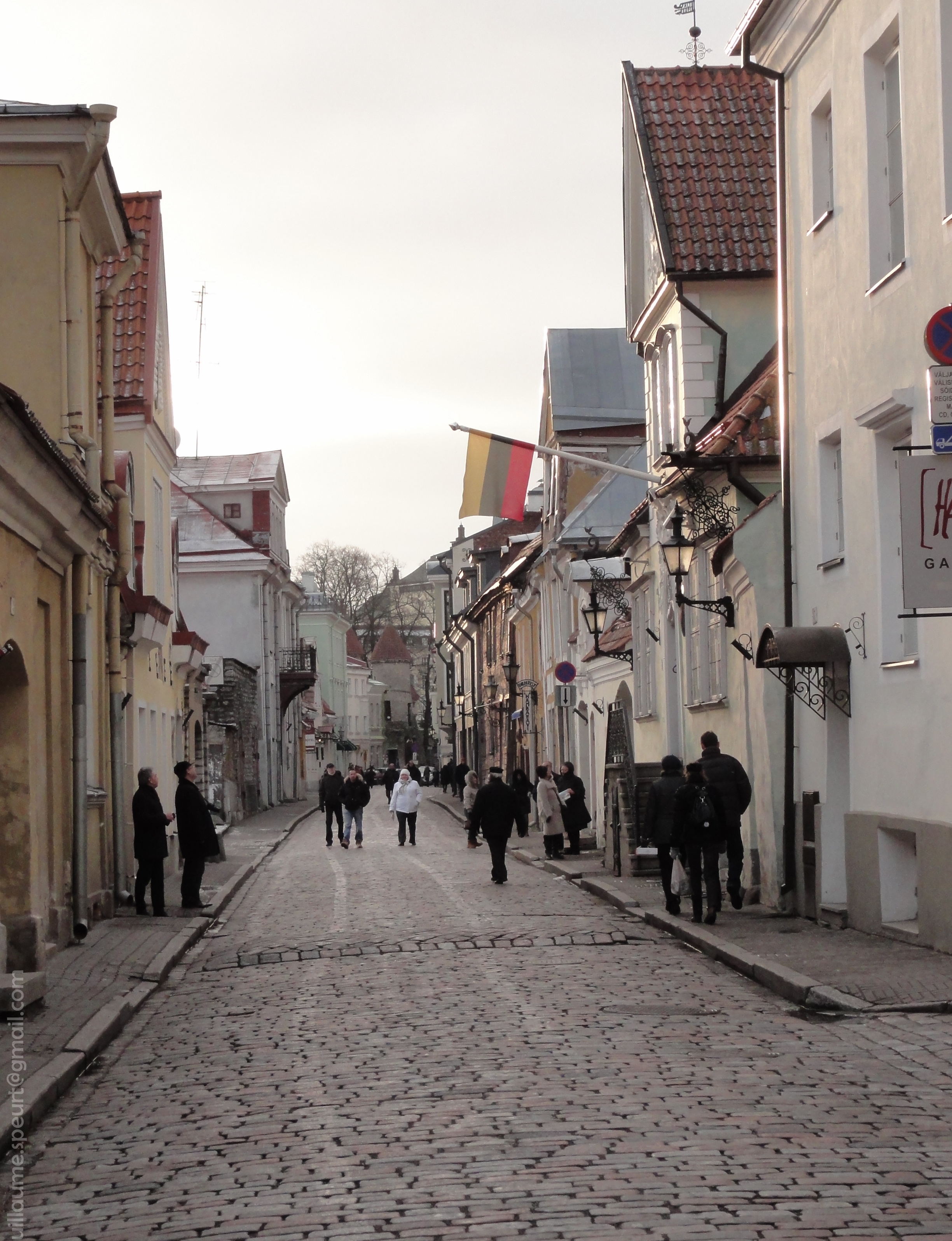 Uus tänav, Tallinn